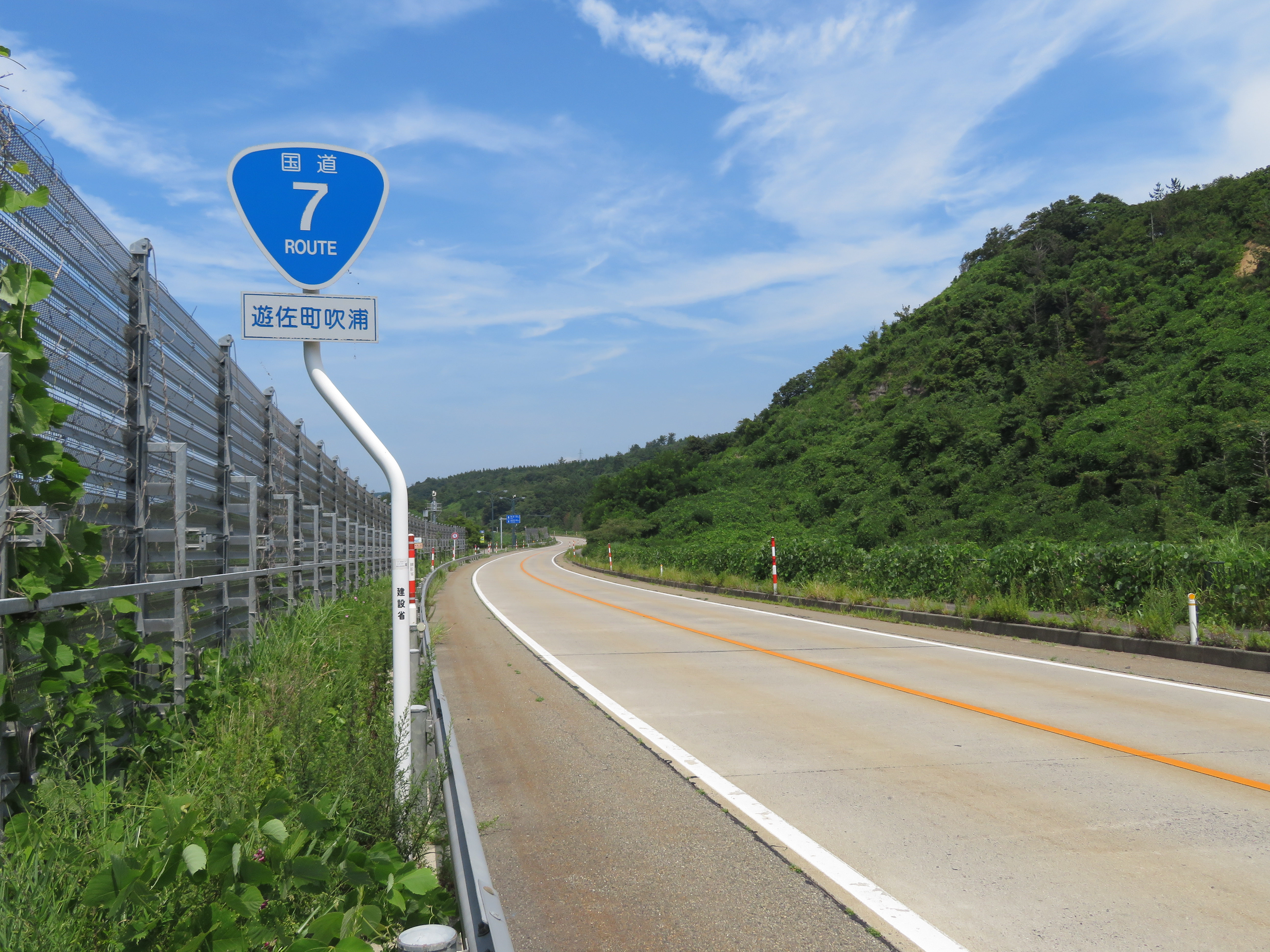 国道7号吹浦バイパス 山形県遊佐町吹浦付近（にかほ方面を撮影）